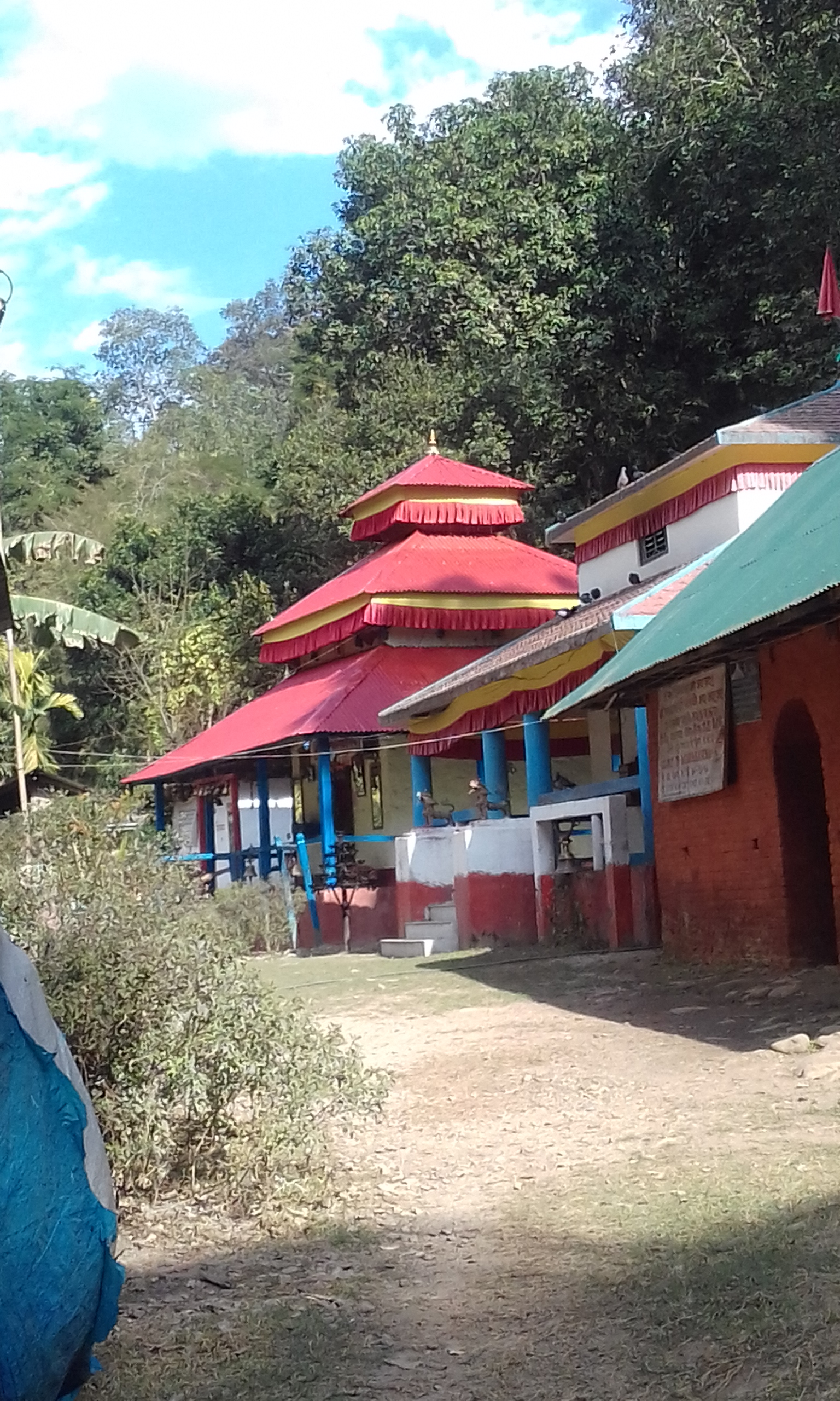 नेपाली: मनकामनाको मन्दिर संखुवा सभा जिल्ला नेपाल